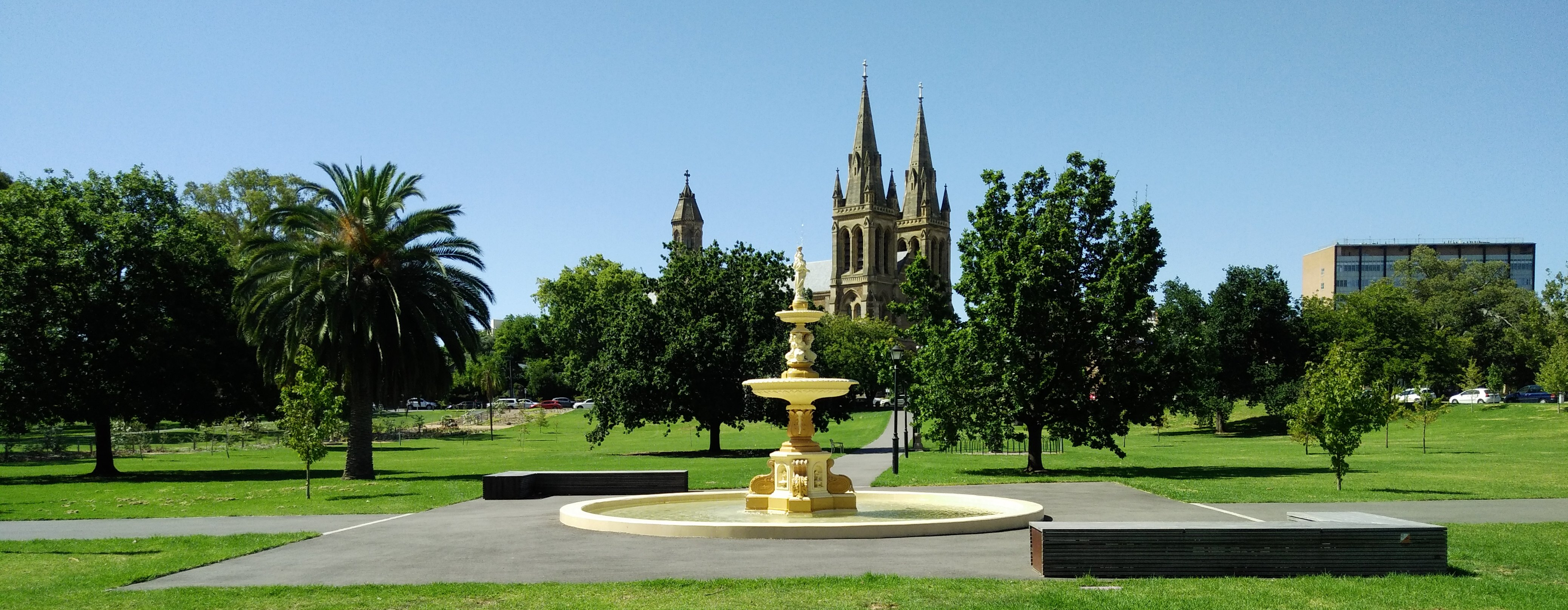 Creswell Gardens Fountain, (Adelaide Park Lands)